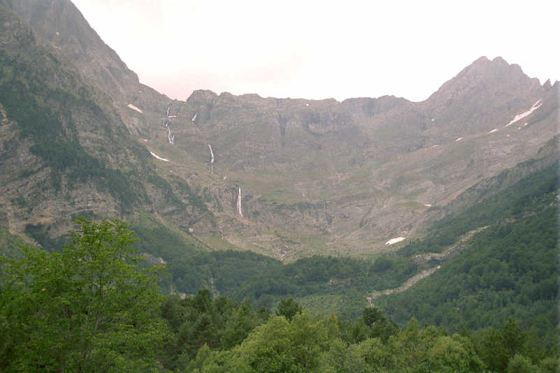 Pared de subida al Balcón de Pineta tomada desde el fondo del Valle de Pineta, el 23 de julio de 2003. Por José María Sánchez para Wikipedia.